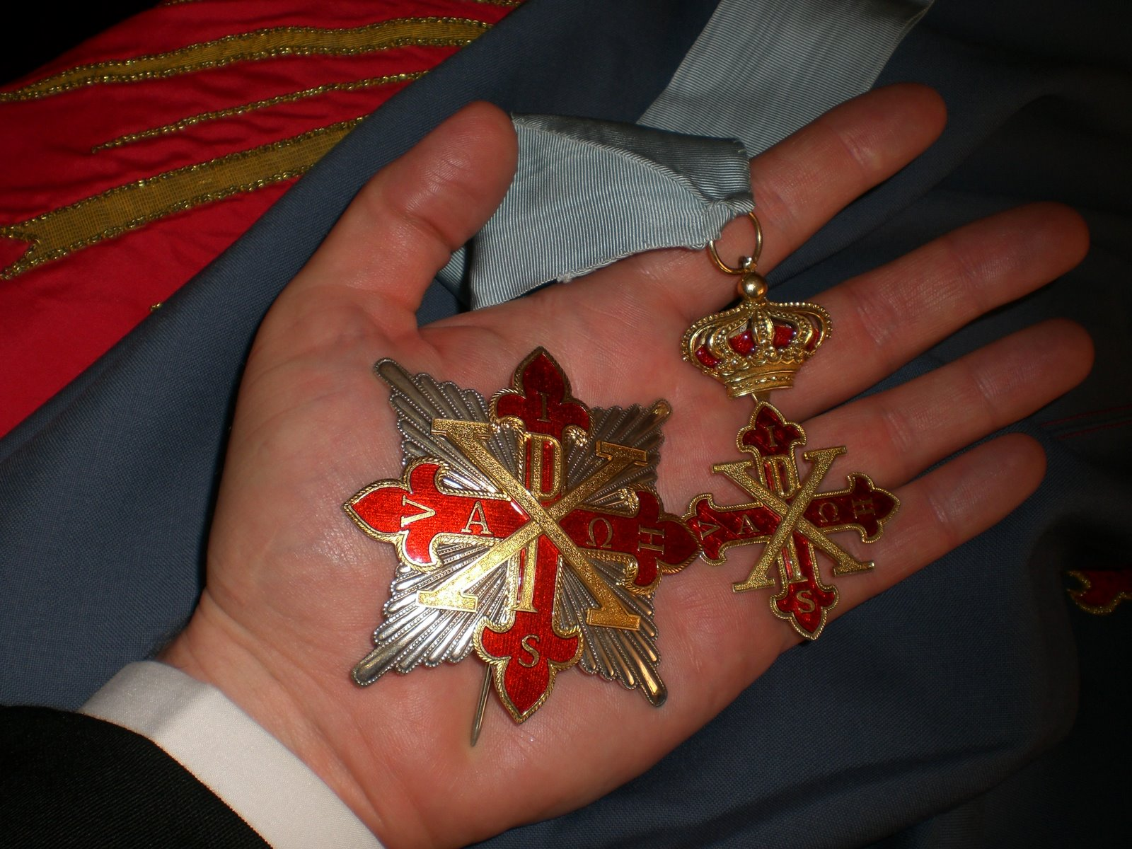 Insignes de chapelain de mérite de l'Ordre constantinien de Saint-Georges